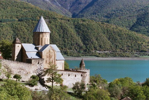 Ananuri Georgia